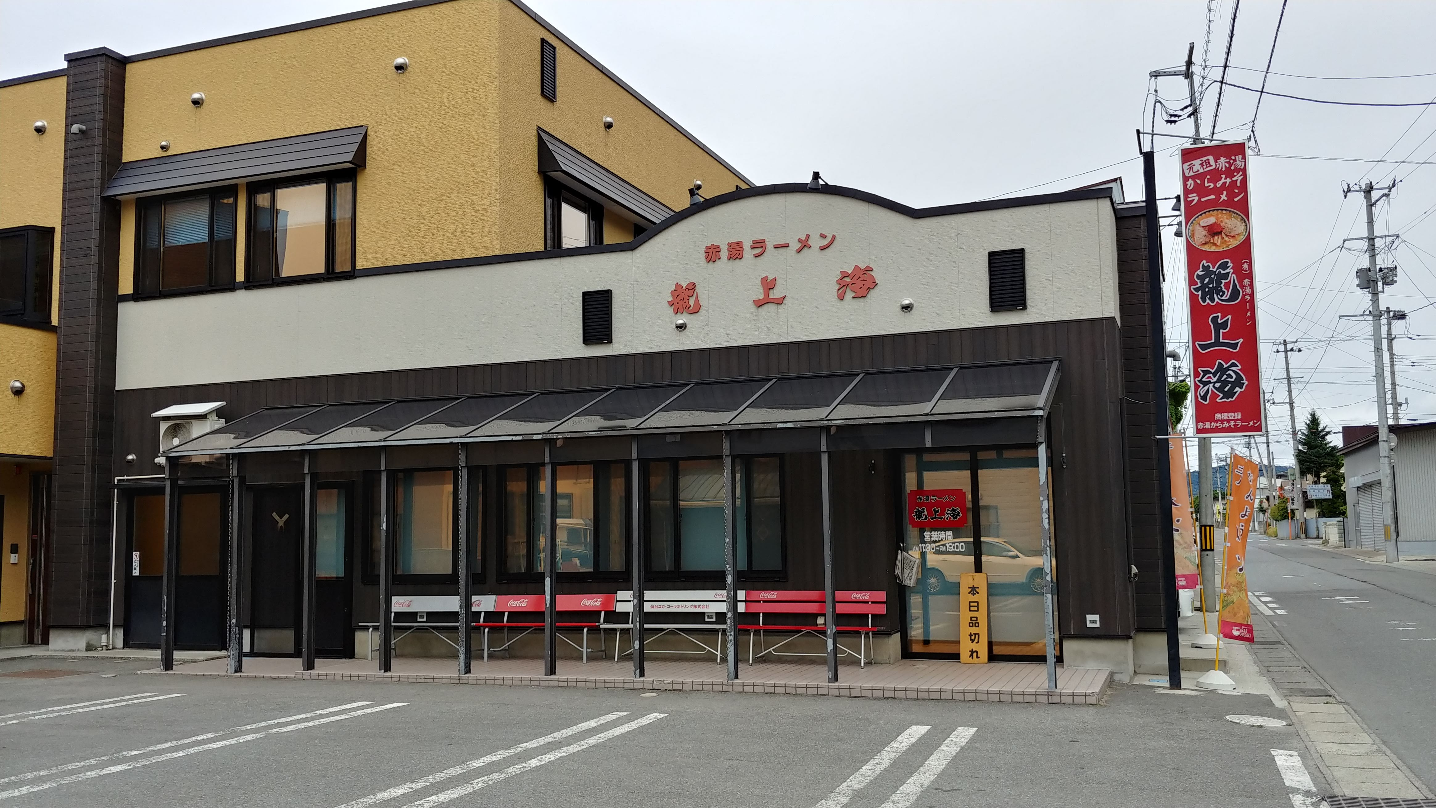 龍上海本店（山形県南陽市赤湯）の店舗の写真です